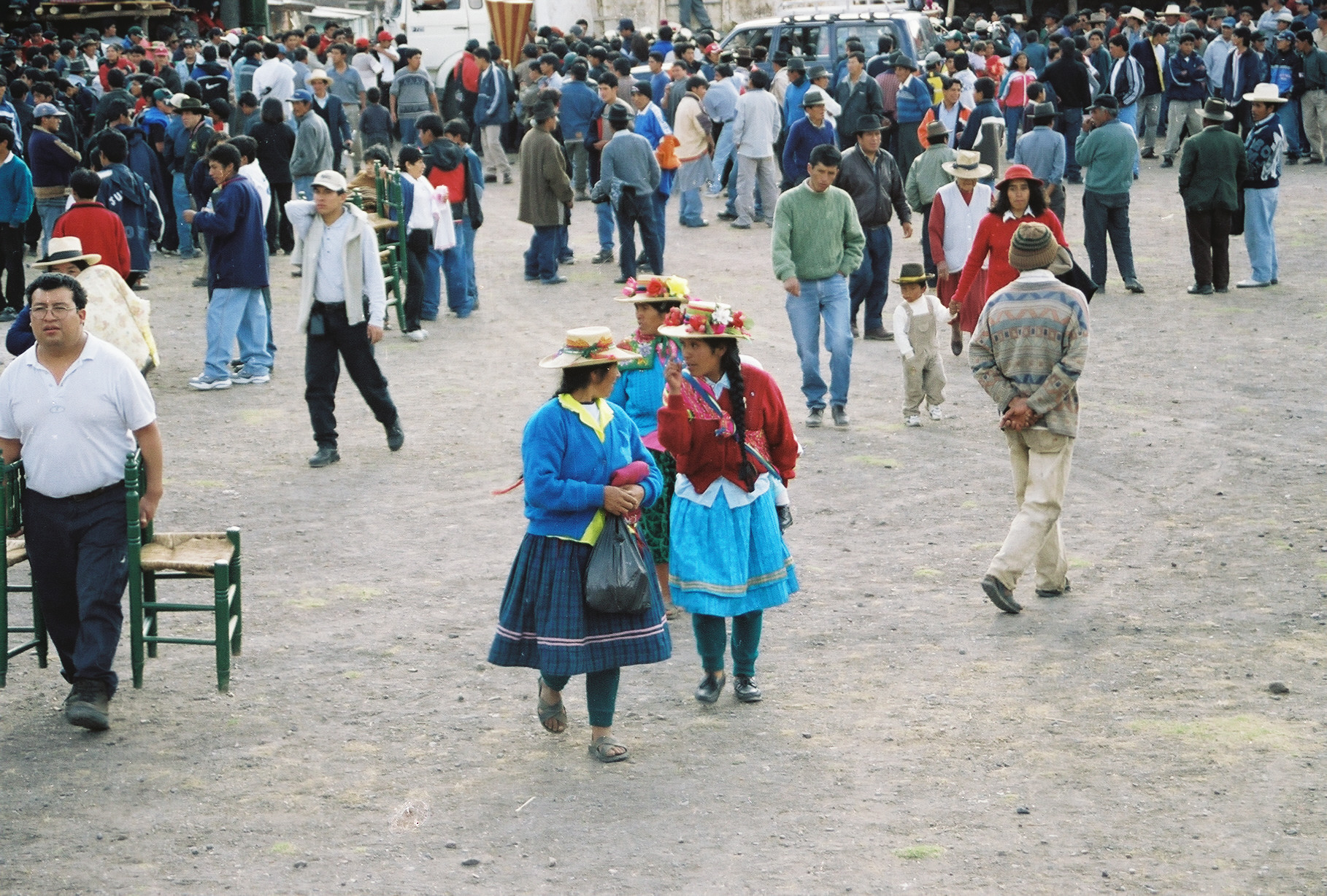 Traditionelle Bekleidung aus der Provincia Bolognesi im Departament Ancash. Chiquián/Peru August 2000 von Uta Freund